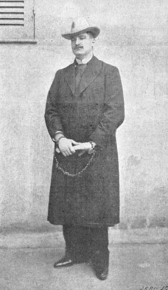 "Max Régis à la prison d'Alger. (Photographie Leroux)".